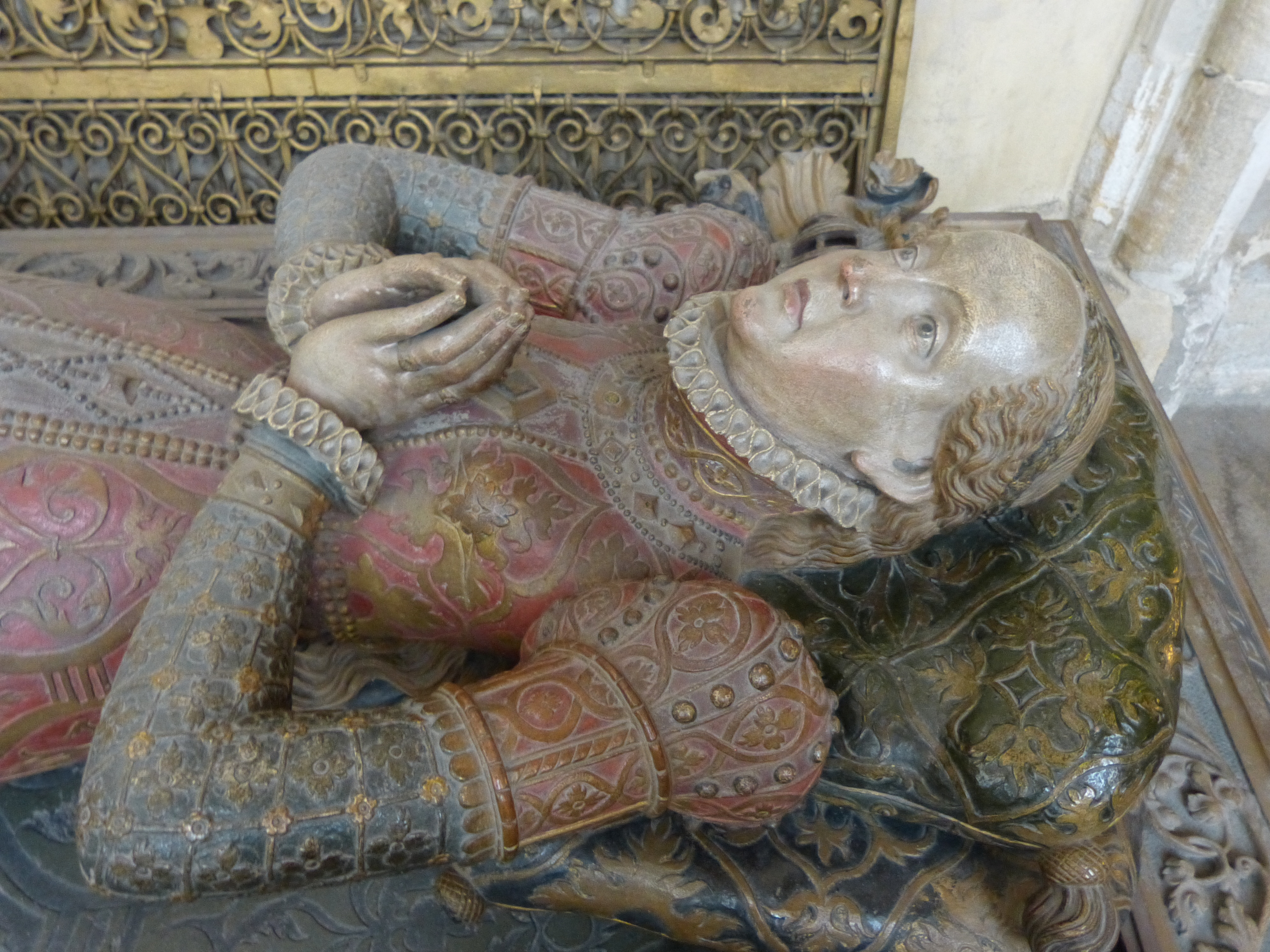 Grablege in der Stiftskirche von Tübingen, Baden-Württembergl